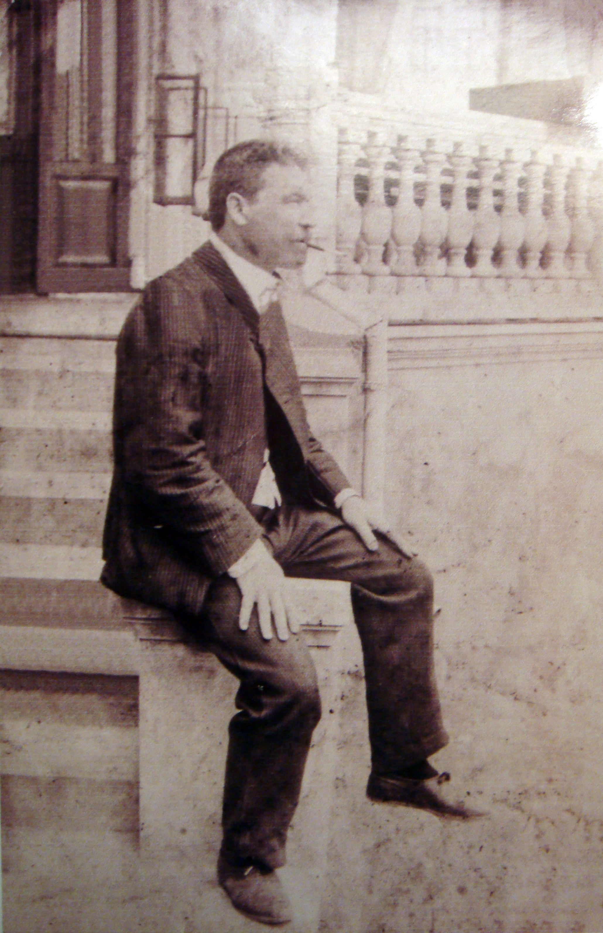 Матвей Щавелев на крыльце усадьбы Шольцев в городе Сумы.